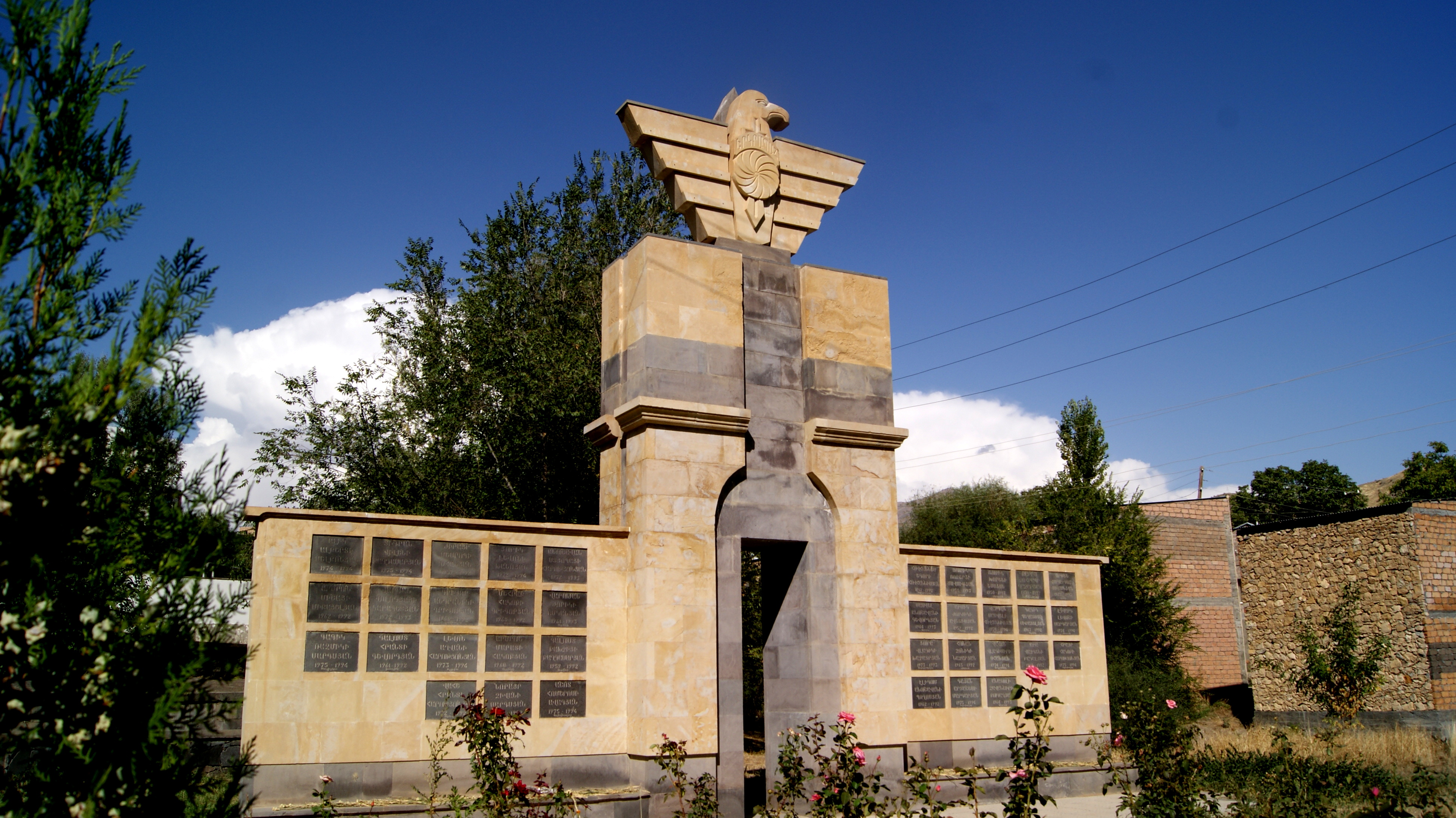 Հուշարձան Արցախյան ազատամարտում զոհվածներին, Եղեգնաձոր 1/11